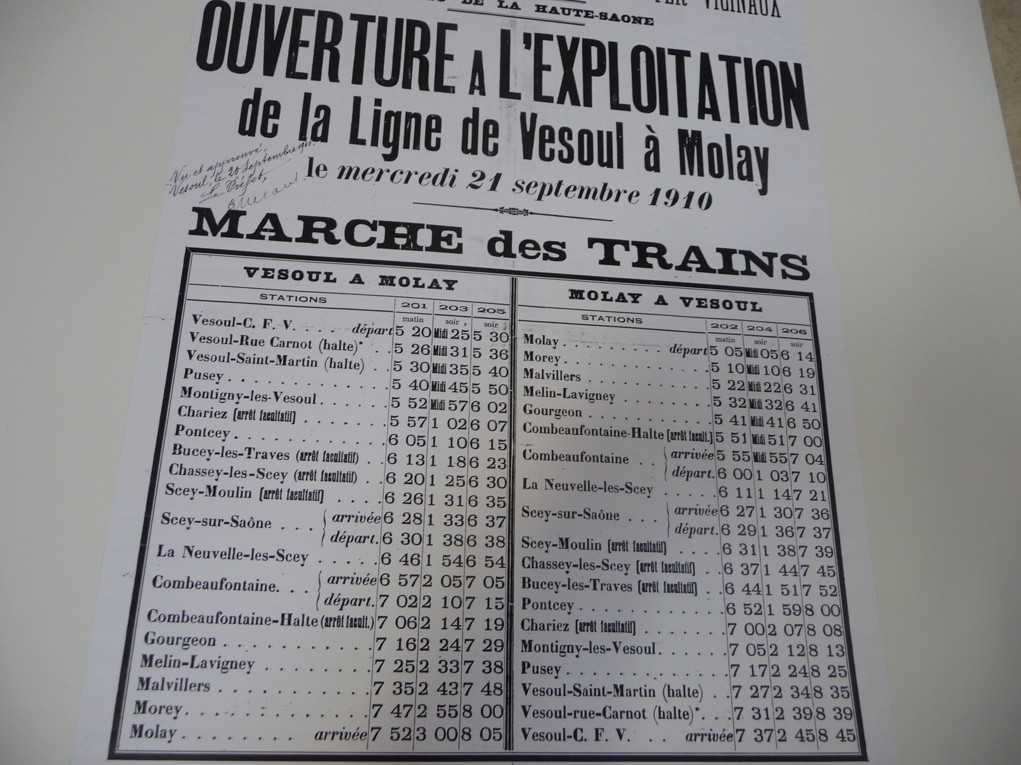 train molay; horaires